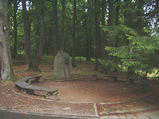 Das Kinderdorf Wegscheide ist das Schullandheim der Stadt Frankfurt am Main , im Bereich der Stadt Bad Orb. Dort wird auch Unterricht abgehalten. Das Jaspertrondell eignet sich gut für Kreisgespräche. Auf dem Gedenkstein der Gründer des Kinderdorfes August Jaspert.